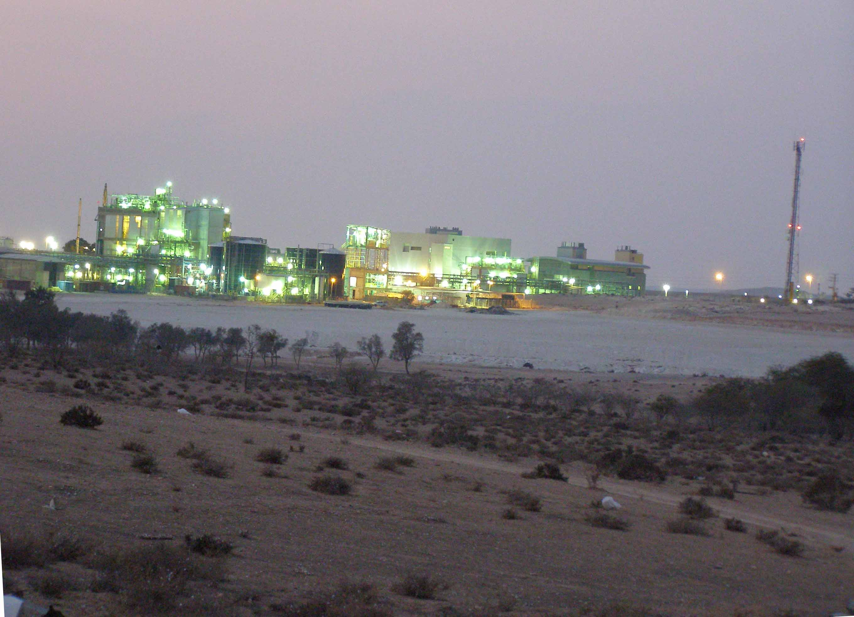 Ramat Hovav industrial area, Israel, at sunset.